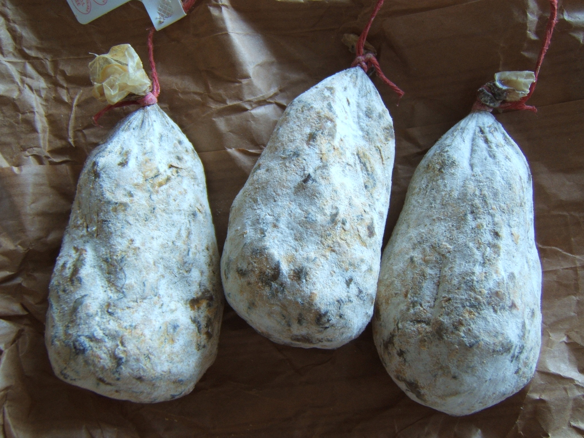 tre piccoli salumi che ho comprato in umbria